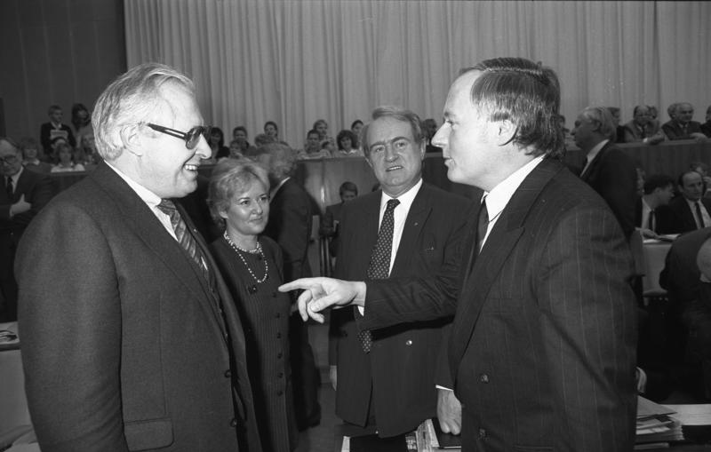 6. November 1987 Bundesratssitzung: Antrittsrede des neuen BR-Präsidenten, Ministerpräsident Dr. Bernhard Vogel (Rheinland-Pfalz).